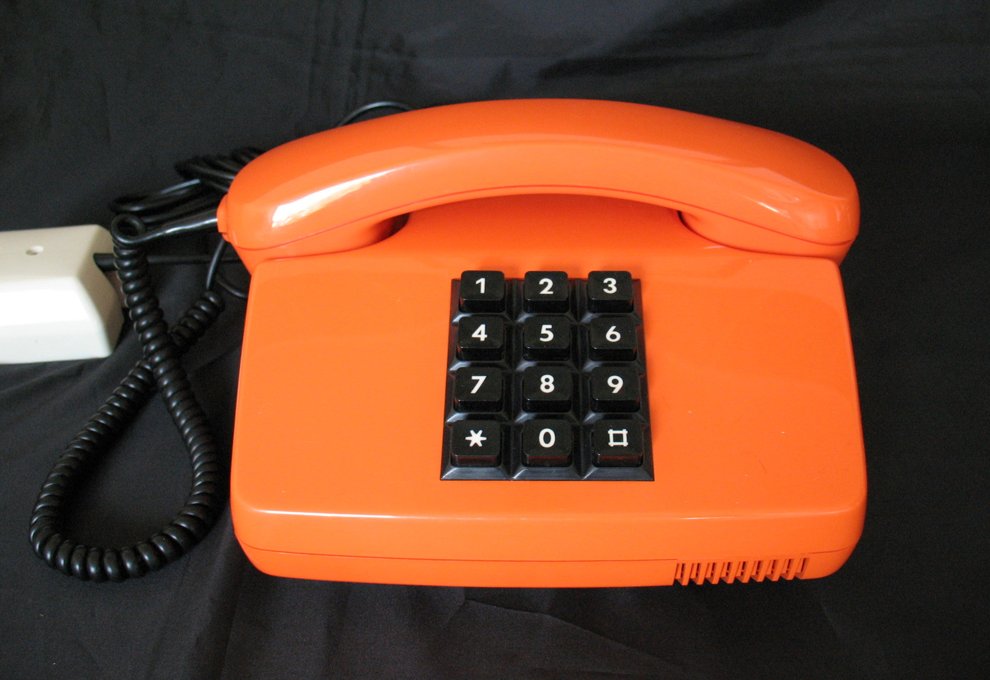 Fernsprechtischapparat FeTAp 751-1 der deutschen Bundespost von 1979